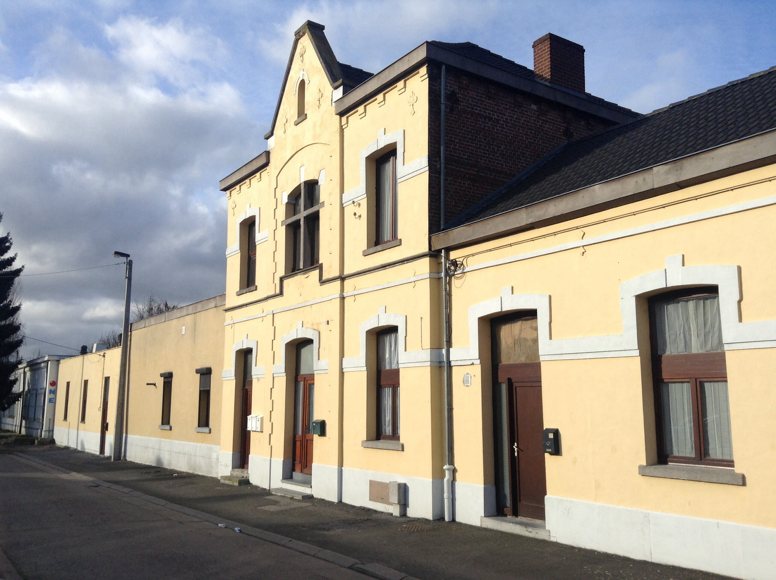 La gare de Flénu-Produits (Belgique wallonne) était située sur la ligne 98 qui reliait Mons à Quiévrain via Cuesmes, Pâturages, Wasmes, Warquignies et Dour. Le trafic voyageur a été supprimé en juin 1984.